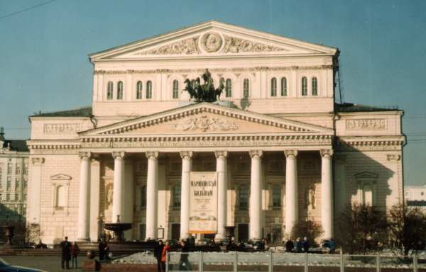 Moskau Bolschoi-Theater